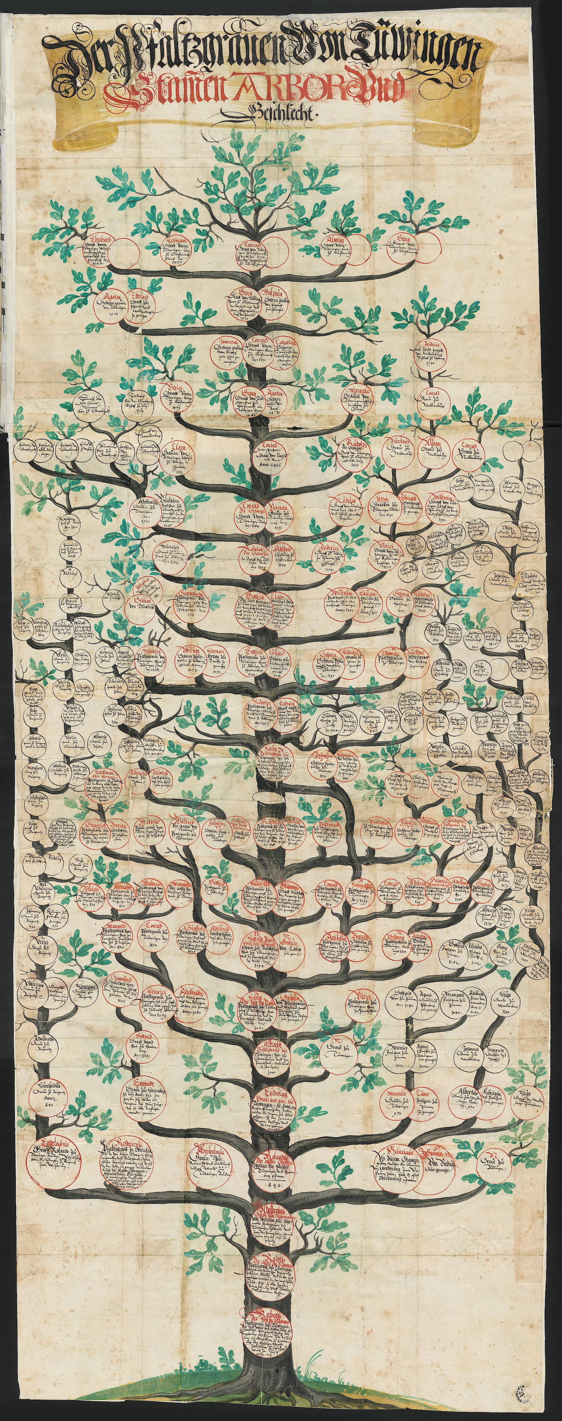 Nachfahrentafeln zur Geschichte des Hauses Württemberg, [Schorndorf], 1591; UB Tübingen, Mh 6,2 Tafel 7: Pfalzgrafen von Tübingen